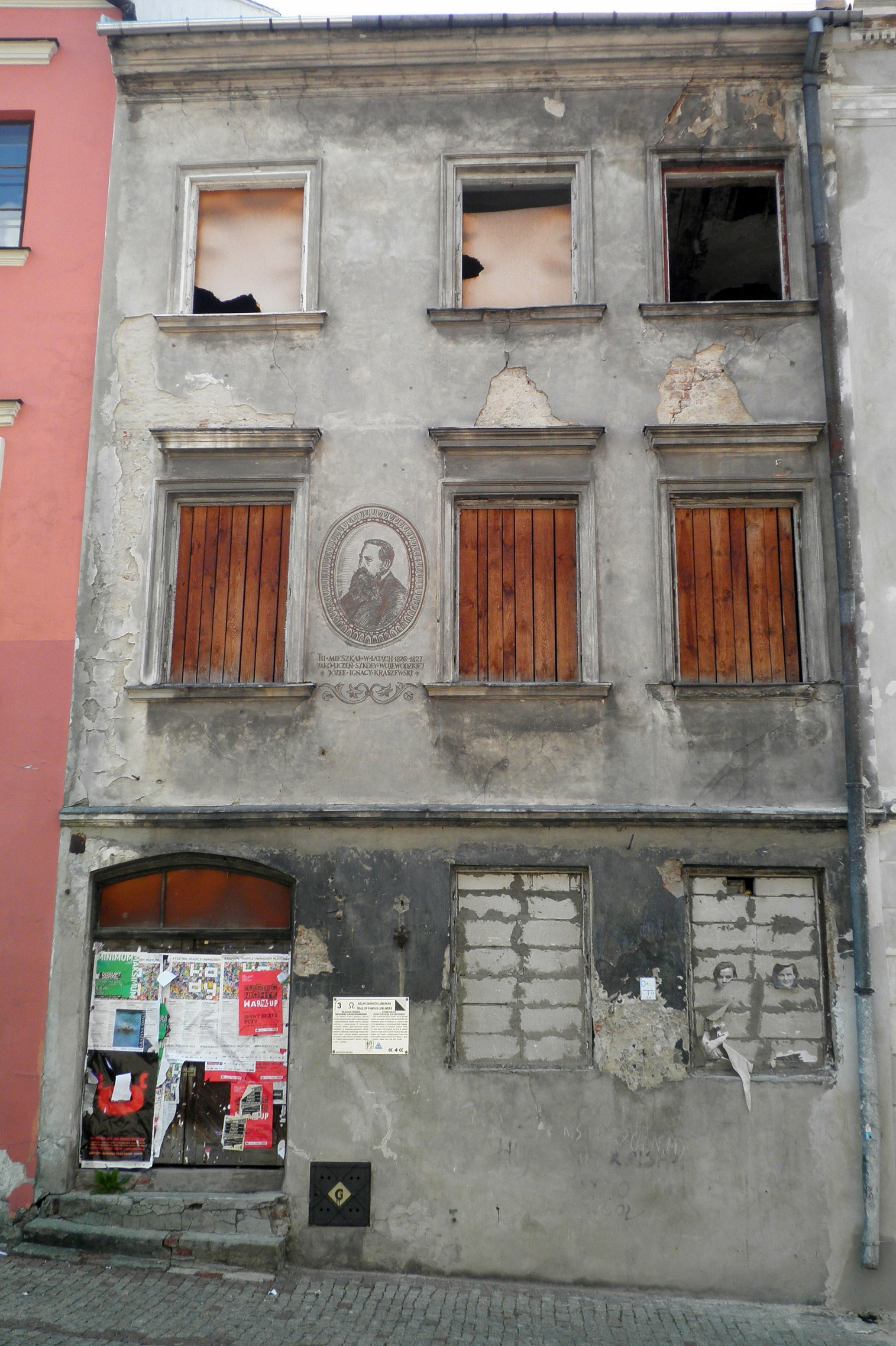 Kamienica przy ul. Grodzkiej 24 na Starym Mieście w Lublinie